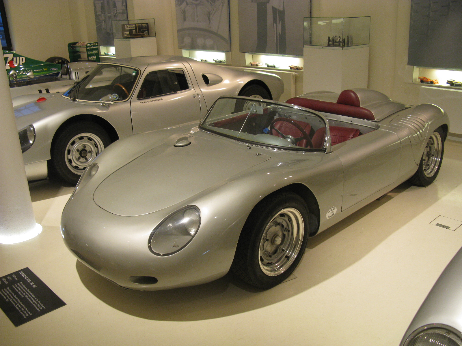 Porsche 718 RS60